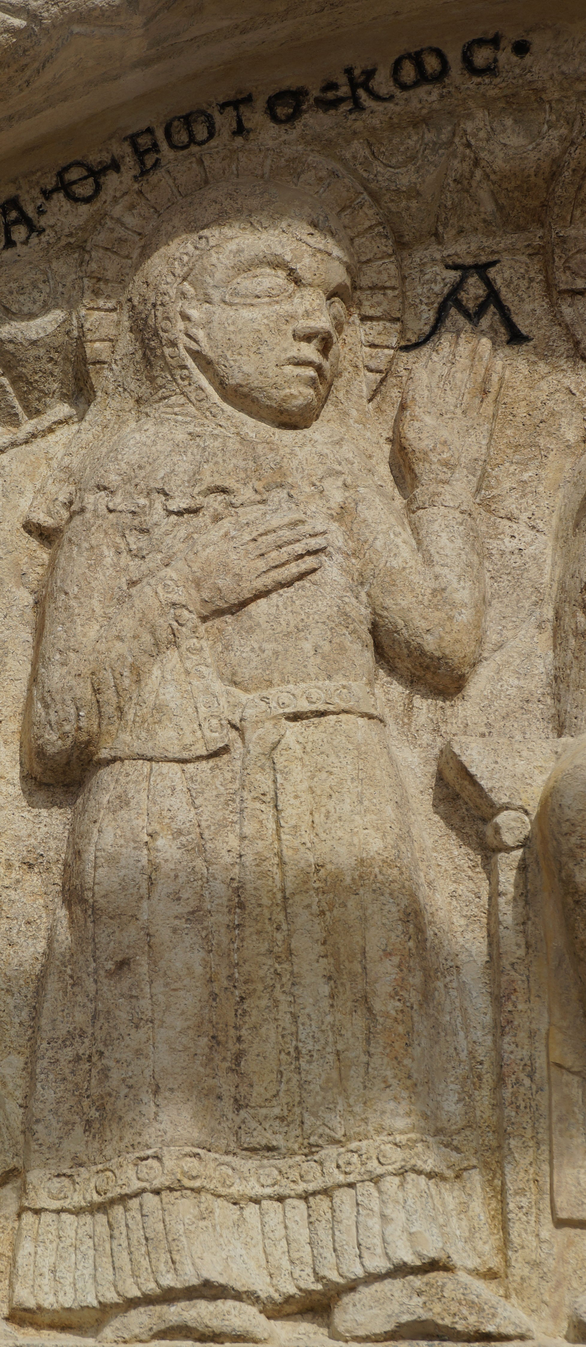 Theotokos (Gottesgebärerin), Abbildung am romanischen Portal vom Kastulusmünster in Moosburg an der Isar